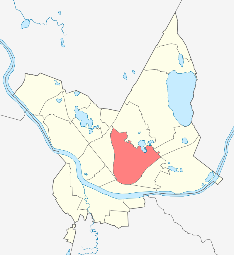 Микрорайон Новое Строение карте Даугавпилса.